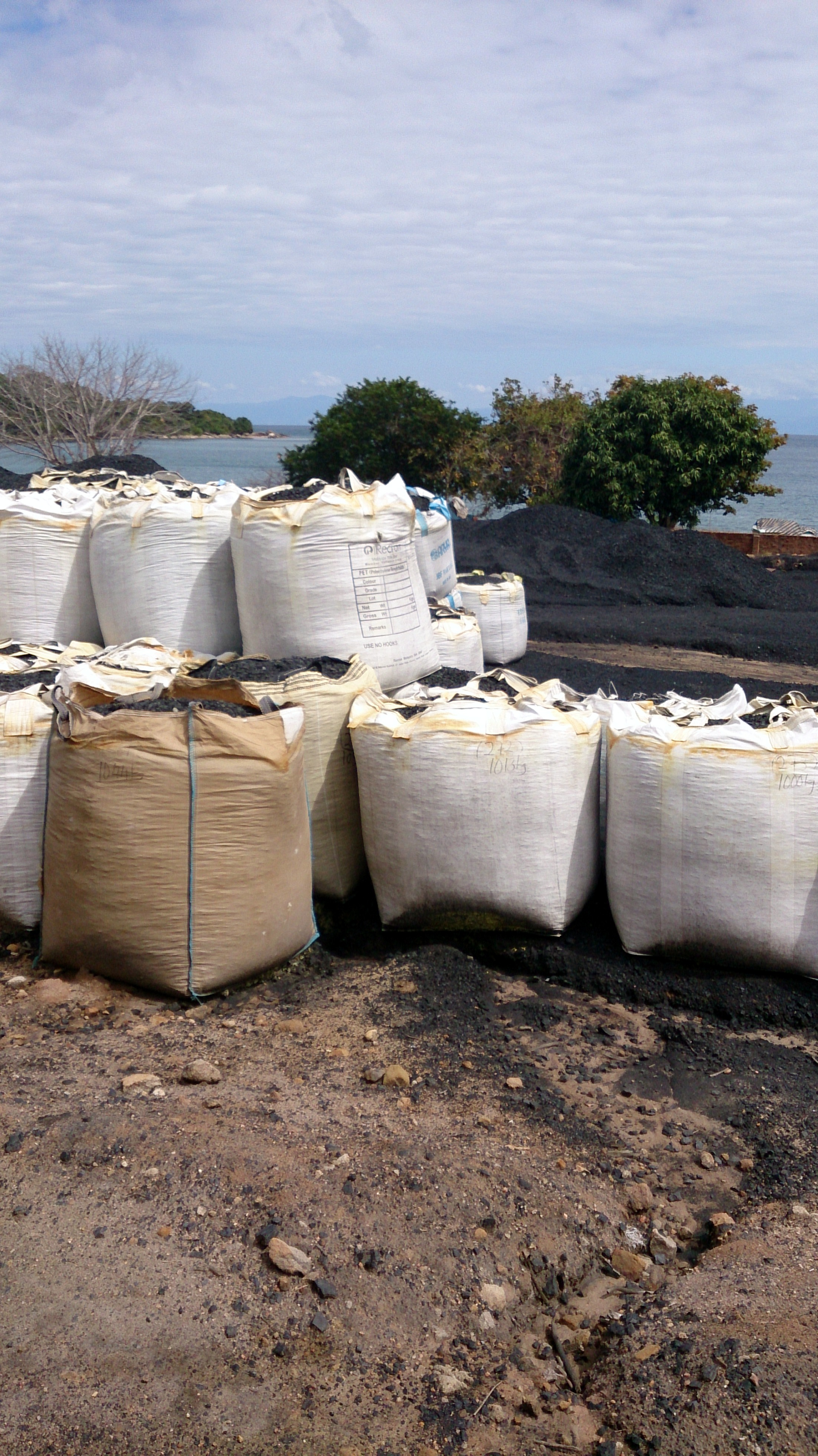 Die im Ludewa District abgebaute Kohle wird mit dem LKW zum Seeufer des Nyassa Sees gebracht und von dort mit dem Boot zum Nordende des Sees. Sie wird in der Zementfabrik bei Mbeya verwertet.